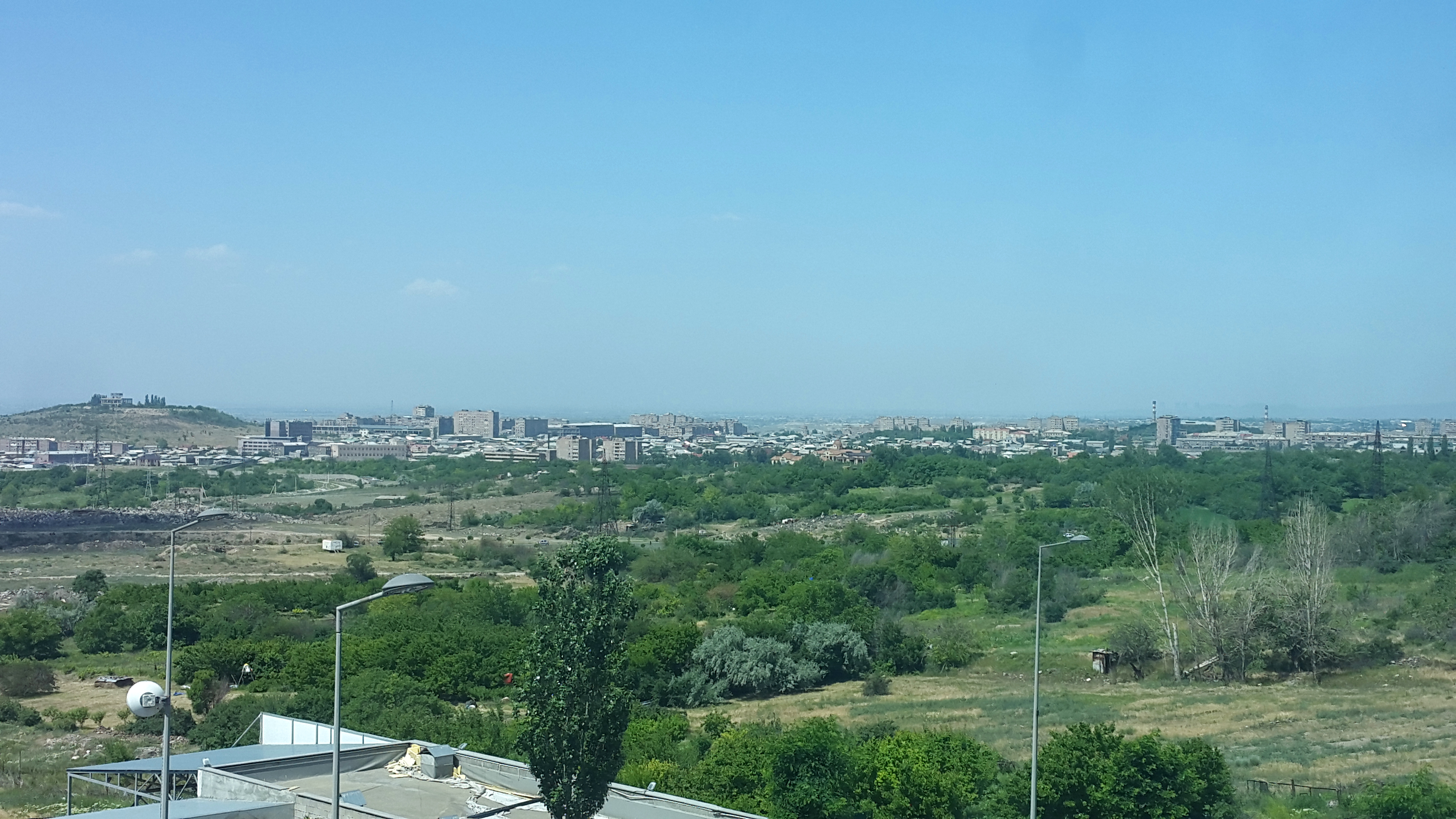 Դալմայի այգիներ